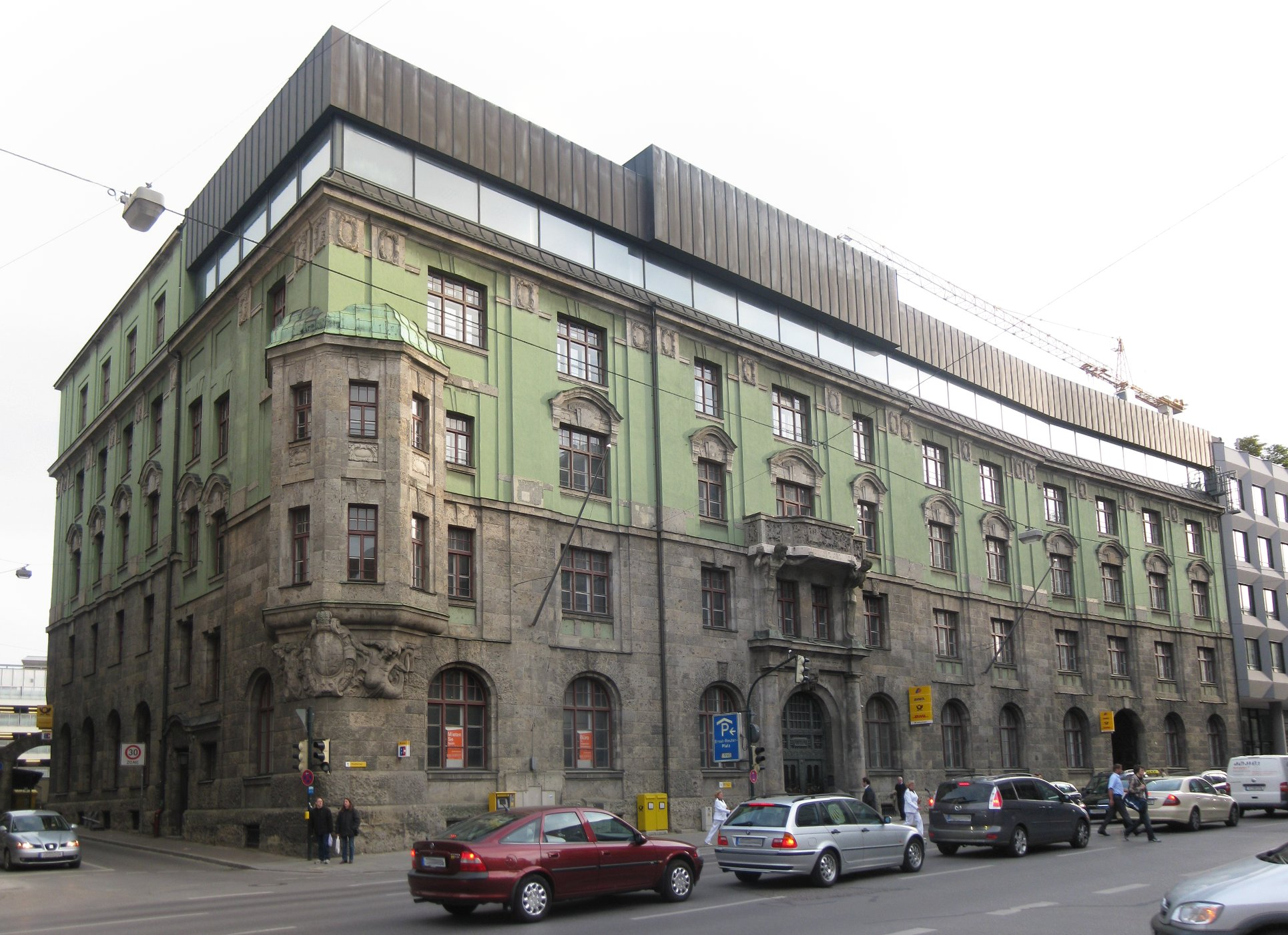 Postgebäude (ehemals Oberpostdirektion) in Augsburg. This image was created with Hugin.